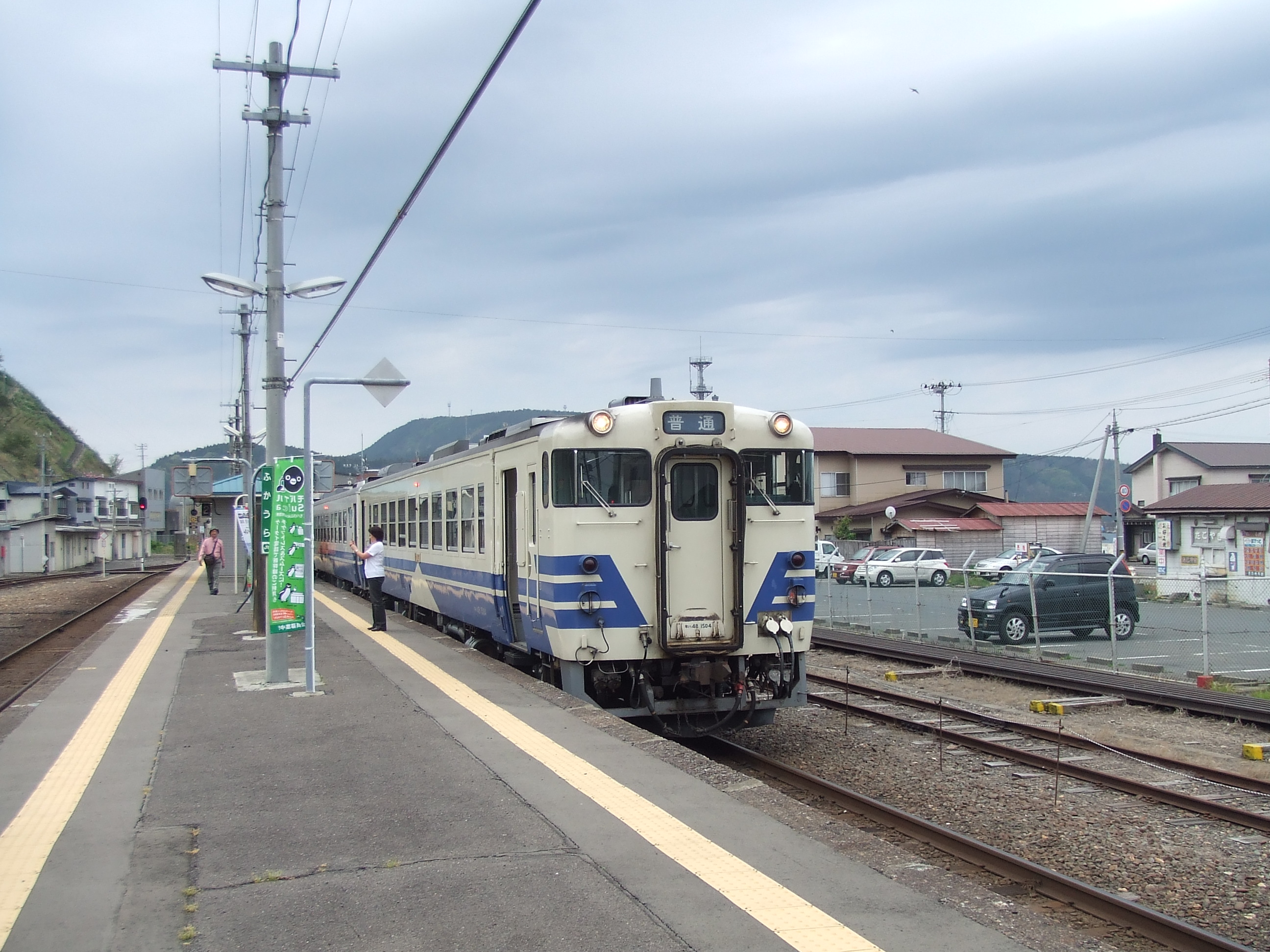 深浦駅 駅構内の様子